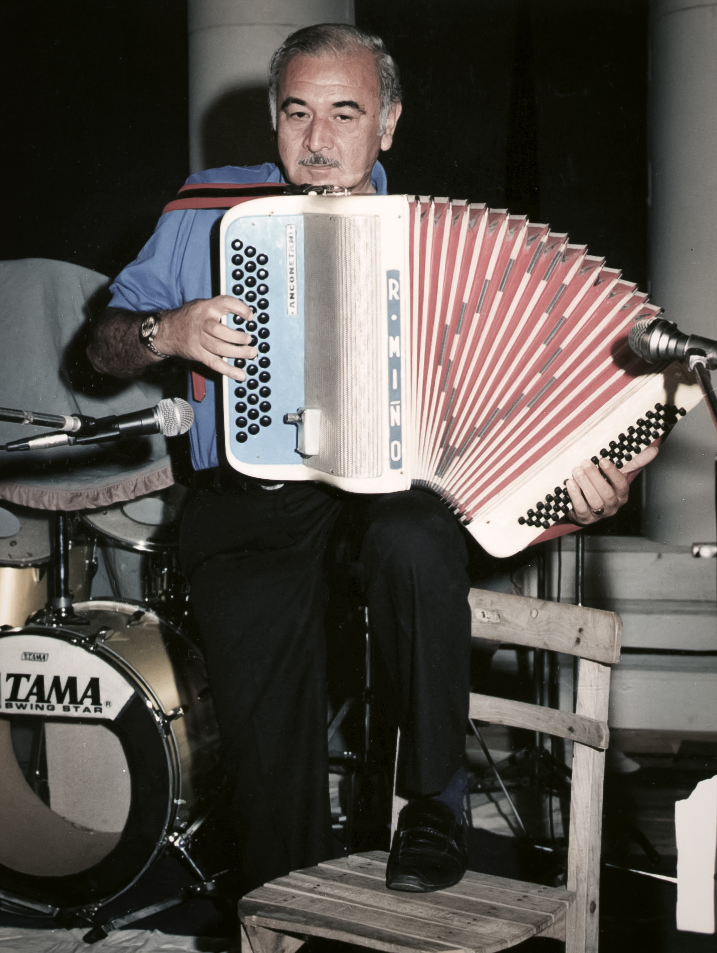 Rubén Miño, compositor y acordeonísta argentino.